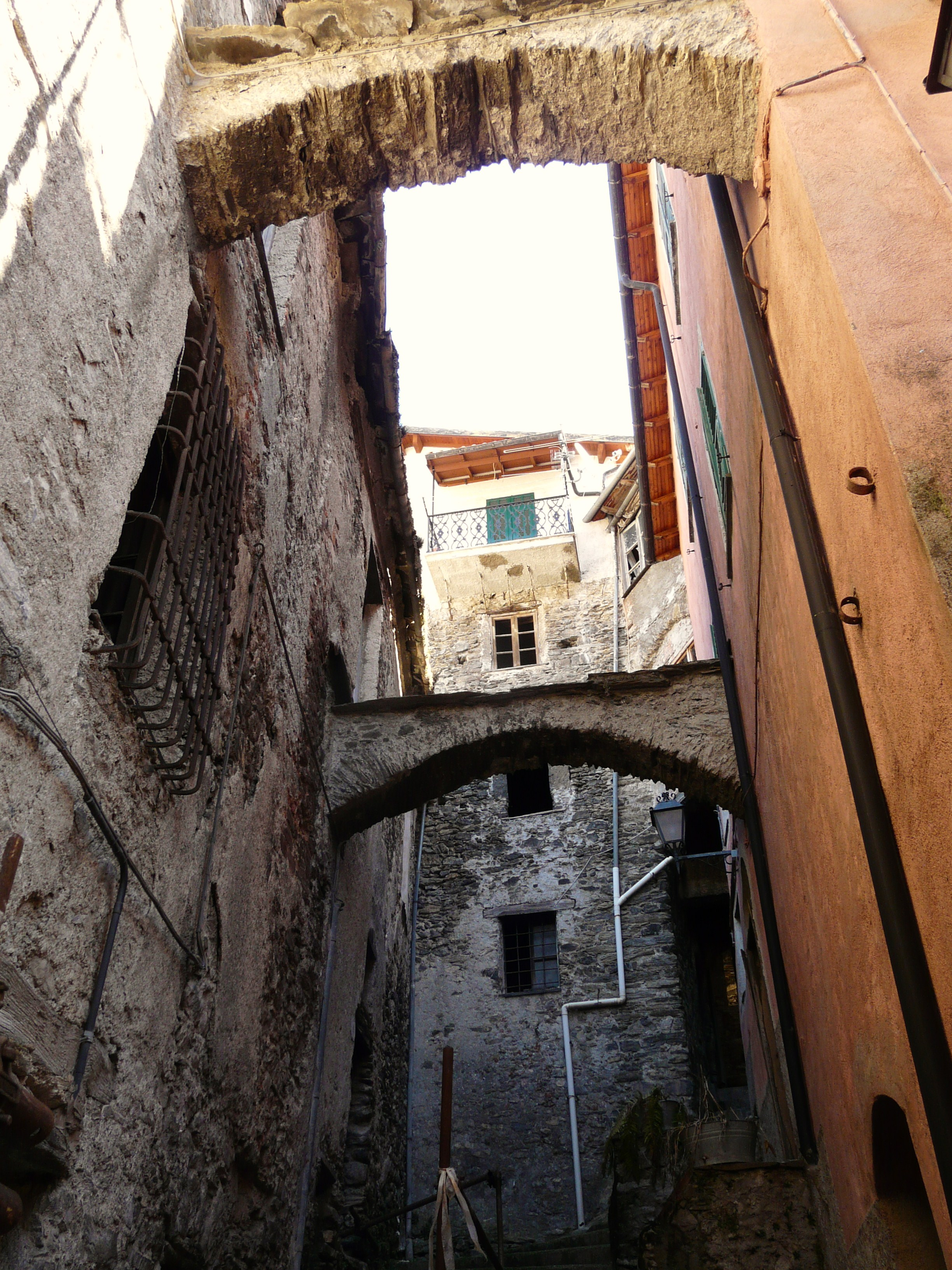 Cosio di Arroscia, Liguria, Italia